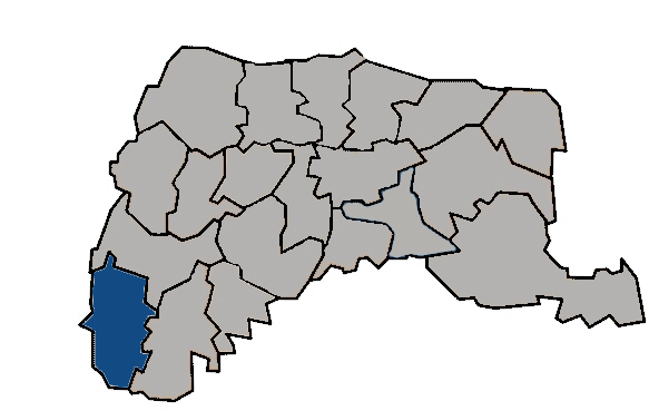 台灣省雲林縣口湖鄉 KaurJmeb於2005年1月28日為編輯zh:口湖鄉所繪製